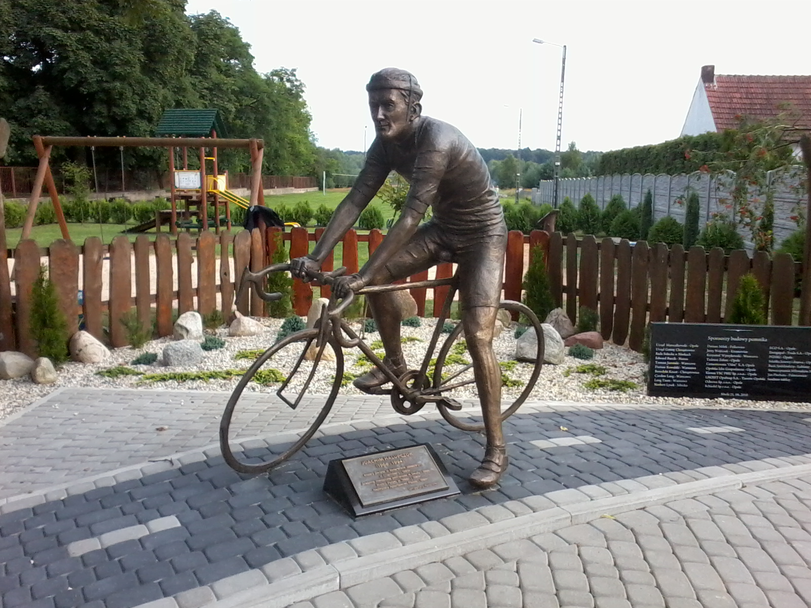 Pomnik Joachima Halupczoka, polskiego kolarza w Niwkach